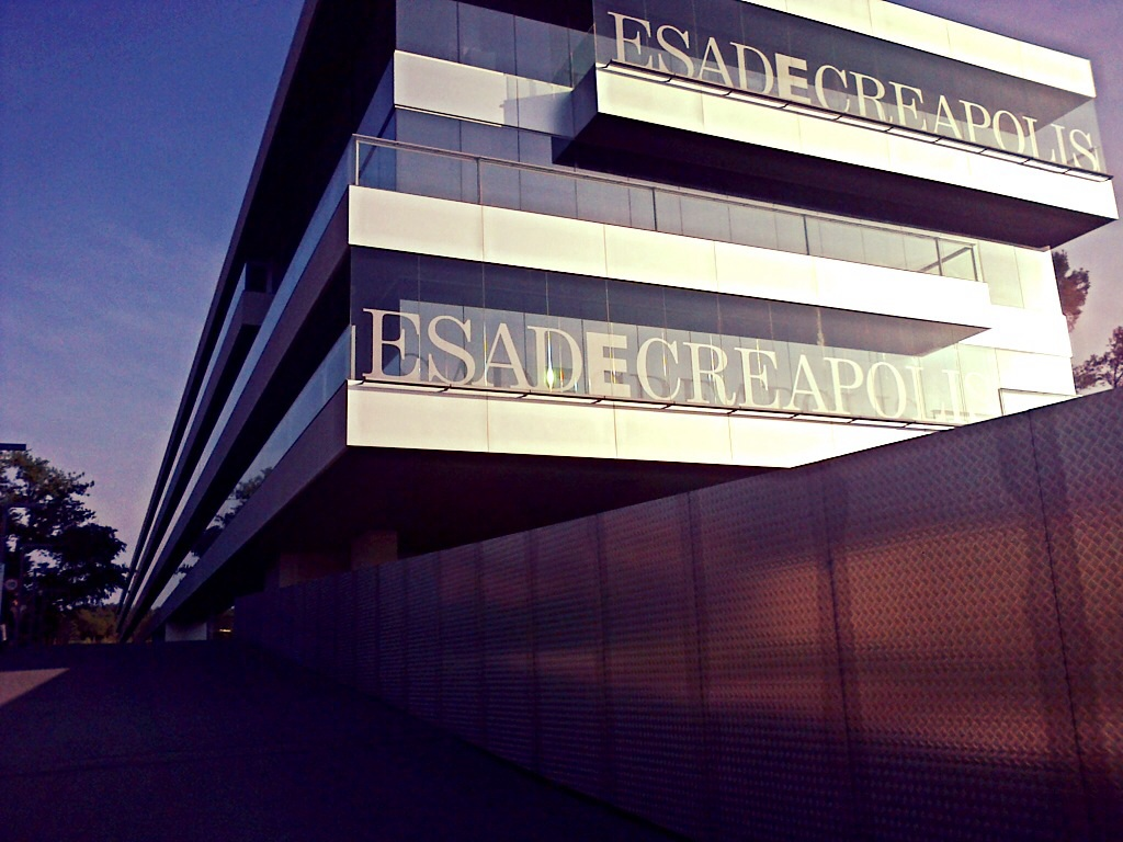 EsadeCreapolis, centre de innovació empresarial